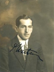 Karel Hartmann (1885-1944), český lední hokejista a advokát